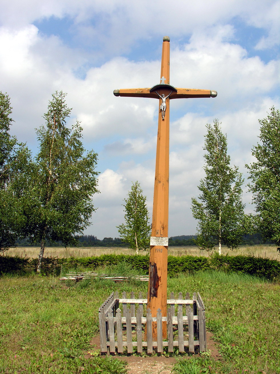 Padvarėliai, Mažeikių raj., Viekšnių seniūnija Kryžius kun. Vaclovui Paulauskui atminti, past. 1998 m. Foto: Algirdas, 2006 m. rugpjūčio 15 d., Lietuva